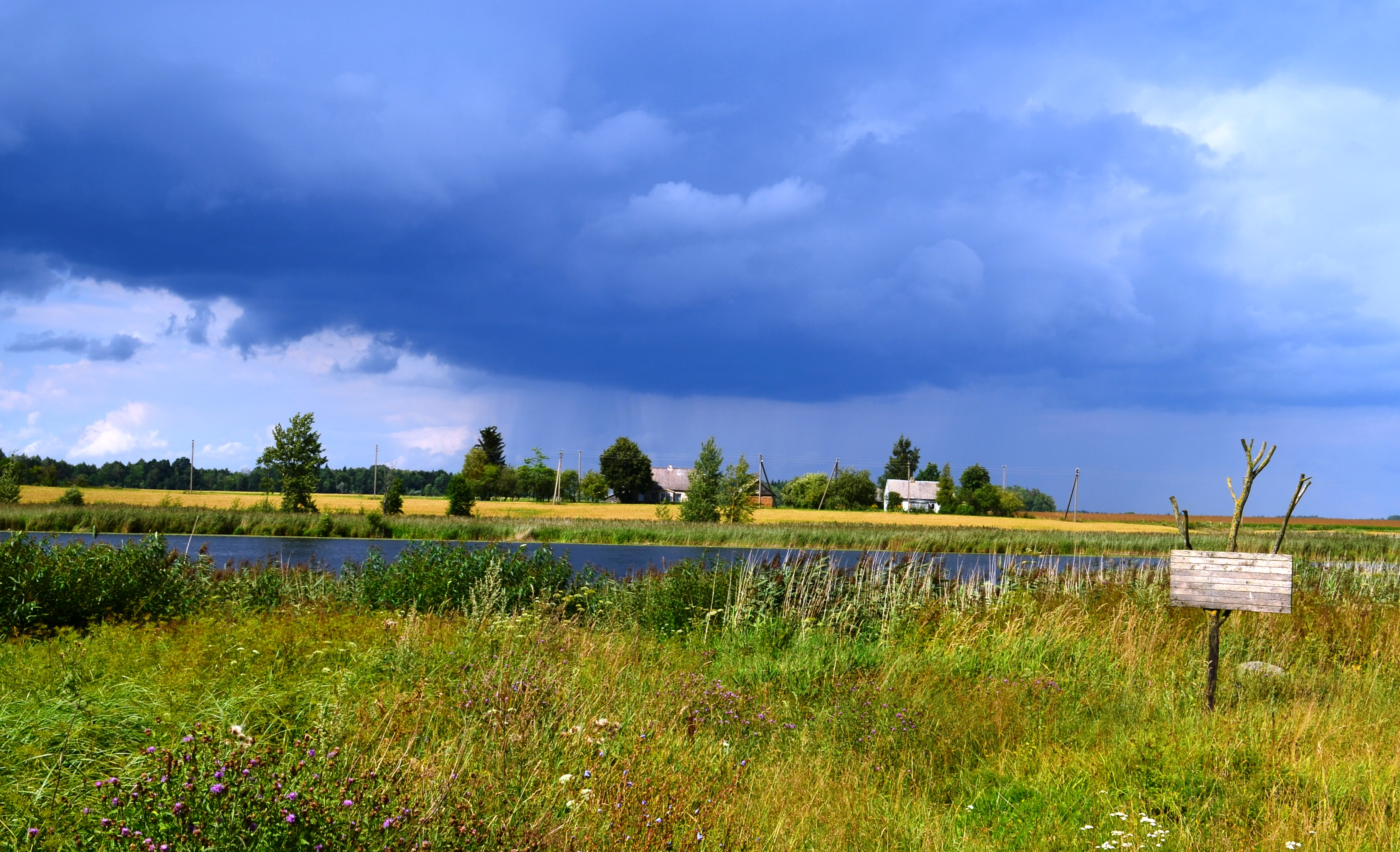 Baublio ežeras ir Antežeriai, Kėdainių raj.